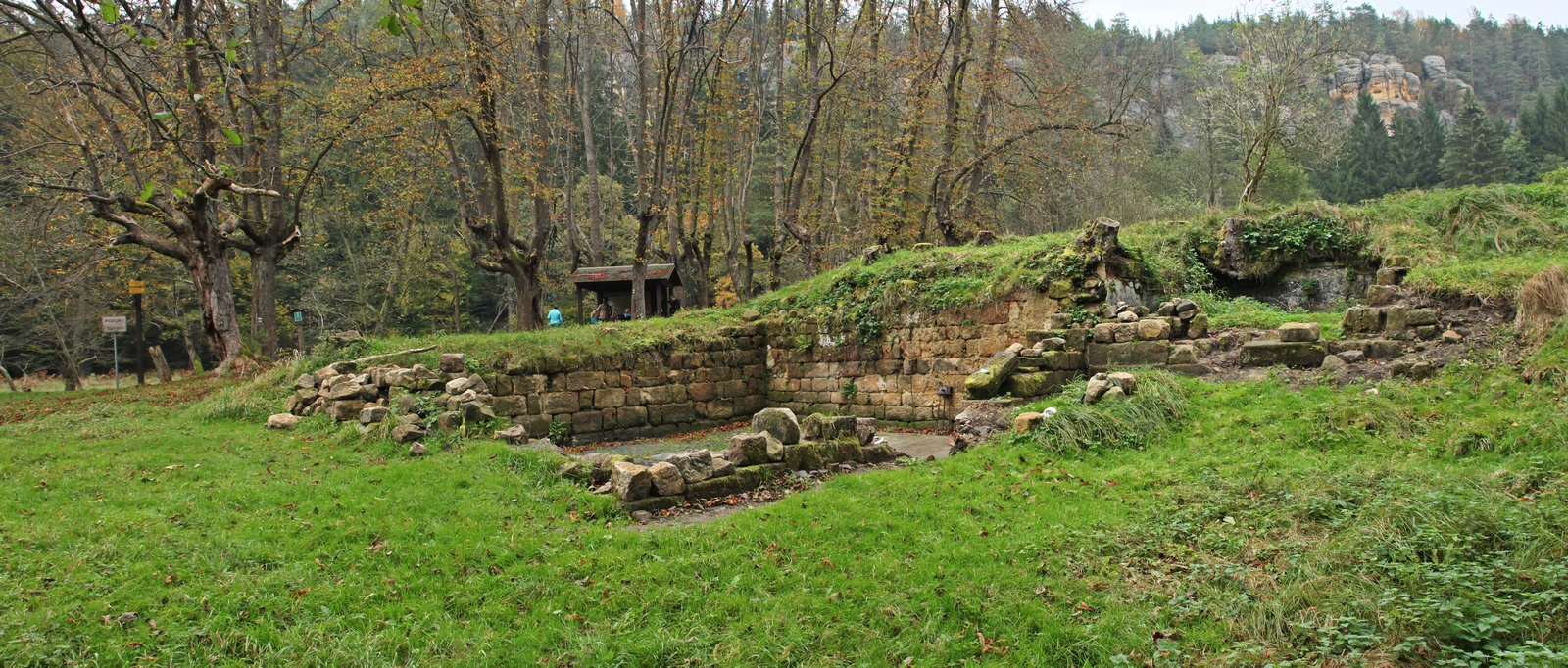 Blick auf die Grundmauern der "Kirnitzschenke" der tschechischen Siedlung Hinterdittersbach (Zadní Jetřichovice) im Kirnitzschtal. Die kleine unmittelbar an der sächsisch-böhmischen Grenze gelegene Ansiedlung war seit dem Ende des 19. Jahrhunderts ein beliebtes Wanderziel. Nach dem II. Weltkrieg wurde die deutsche Bevölkerung vertrieben und die Gebäude abgerissen. Nur ein paar Grundmauern bleiben erhalten. Im Hintergrund rechts ist die Felswand der Rabensteine zu sehen.